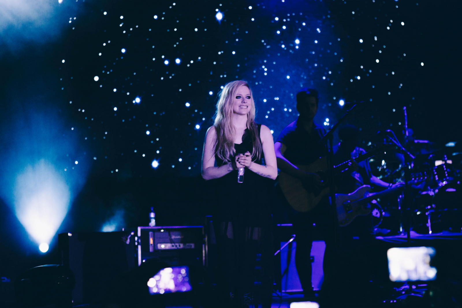 Avril Lavigne in Brasilia, Brazil in The Avril Lavigne Tour